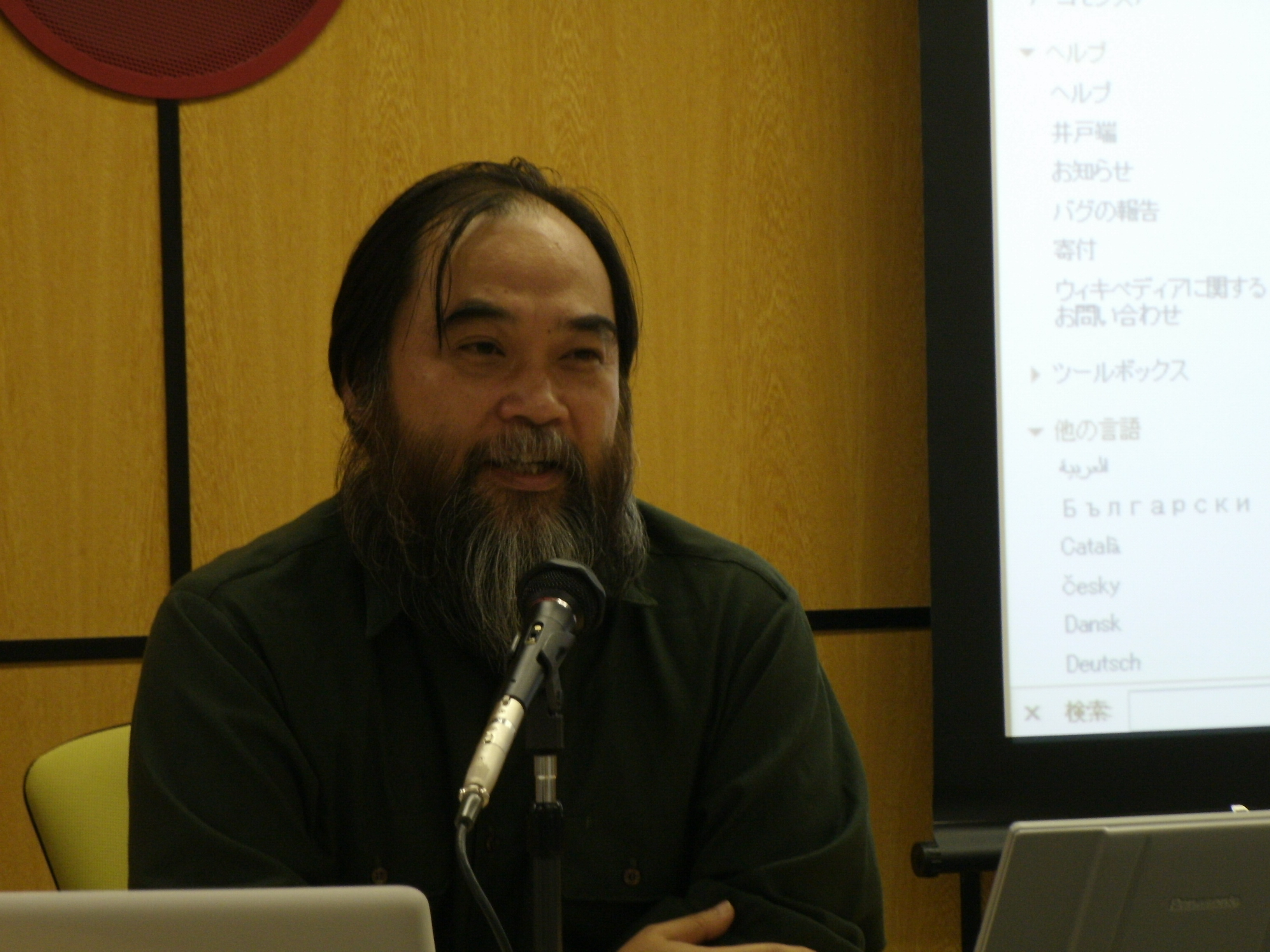 WCJ2010で話す山田晴通氏：撮影について本人承諾済